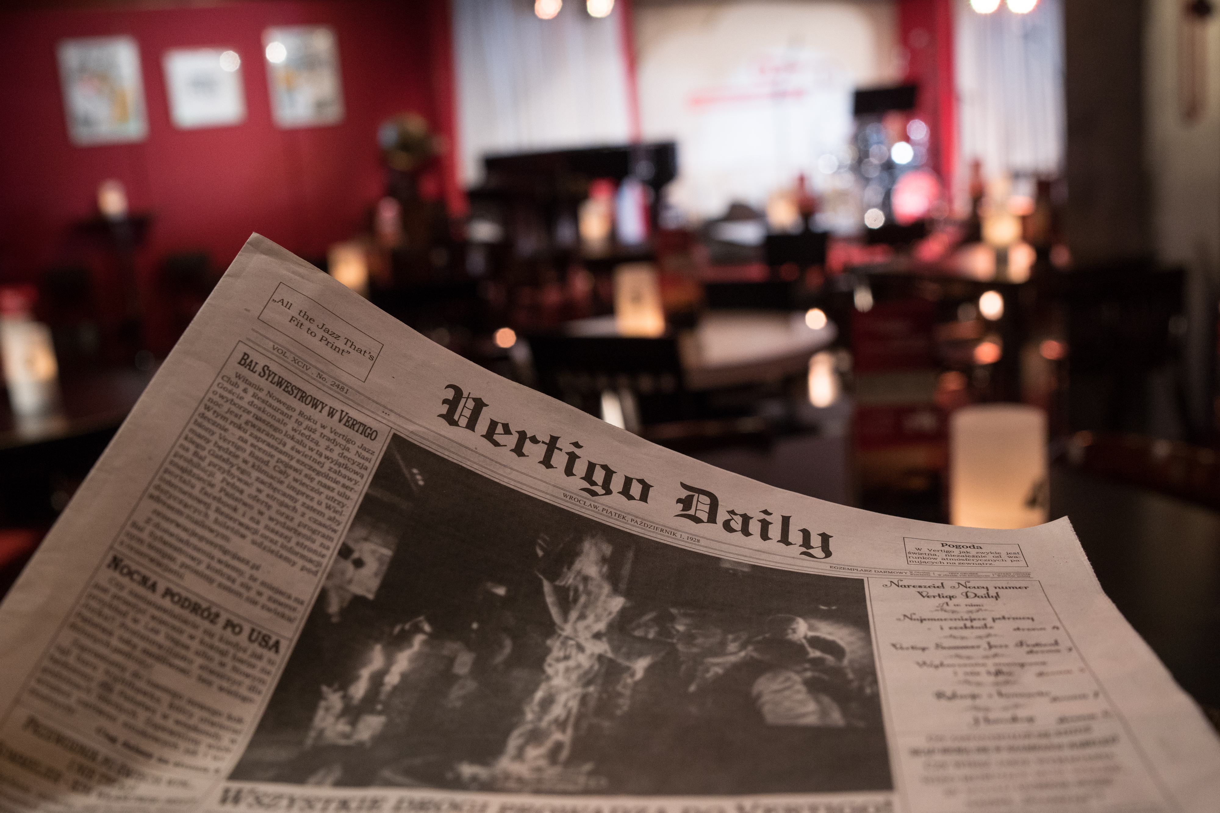 Wydawana od 2018 roku i od samego początku redagowana przez pracowników oraz przyjaciół klubu.